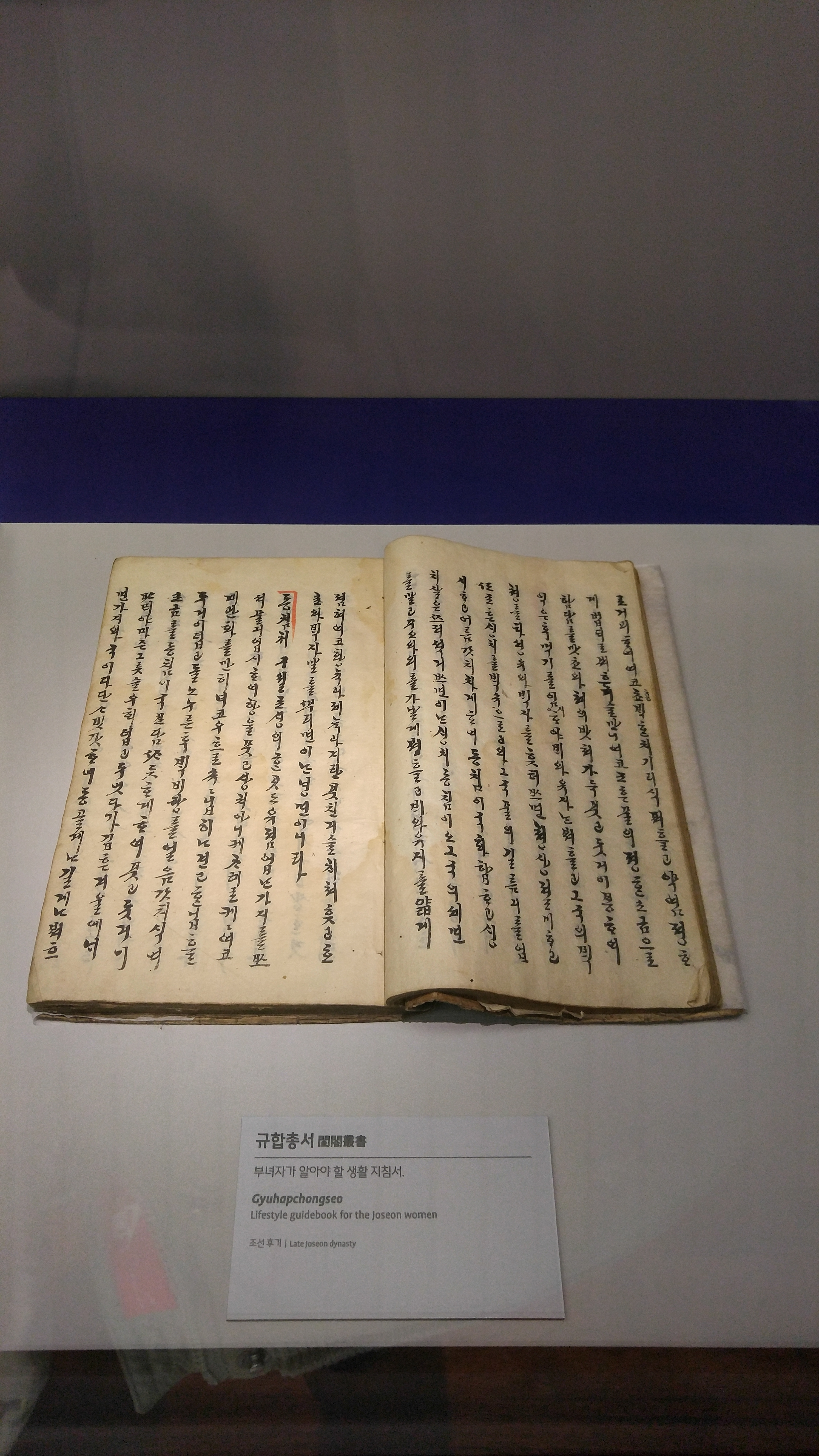 규합총서(1)